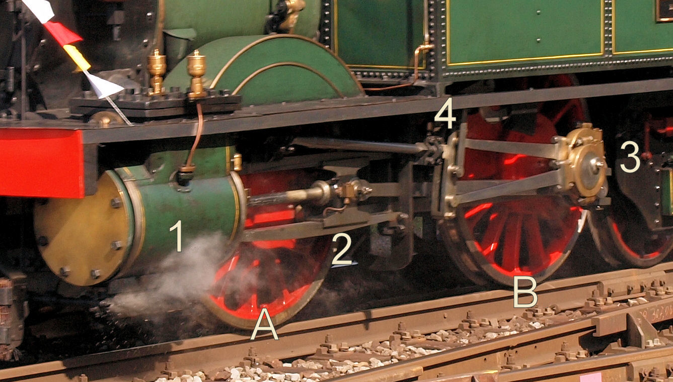 Ansicht der Dampfmaschine der SCB Ec 2/5 "Genf" Legende: A.Treibachse B.Kuppelachse 1.Zylinder 2.Kreuzkopf 3.Treibzapfen mit Exzenter der Streuerung 4.Äusserer Steuerung der Bauart Stephenson